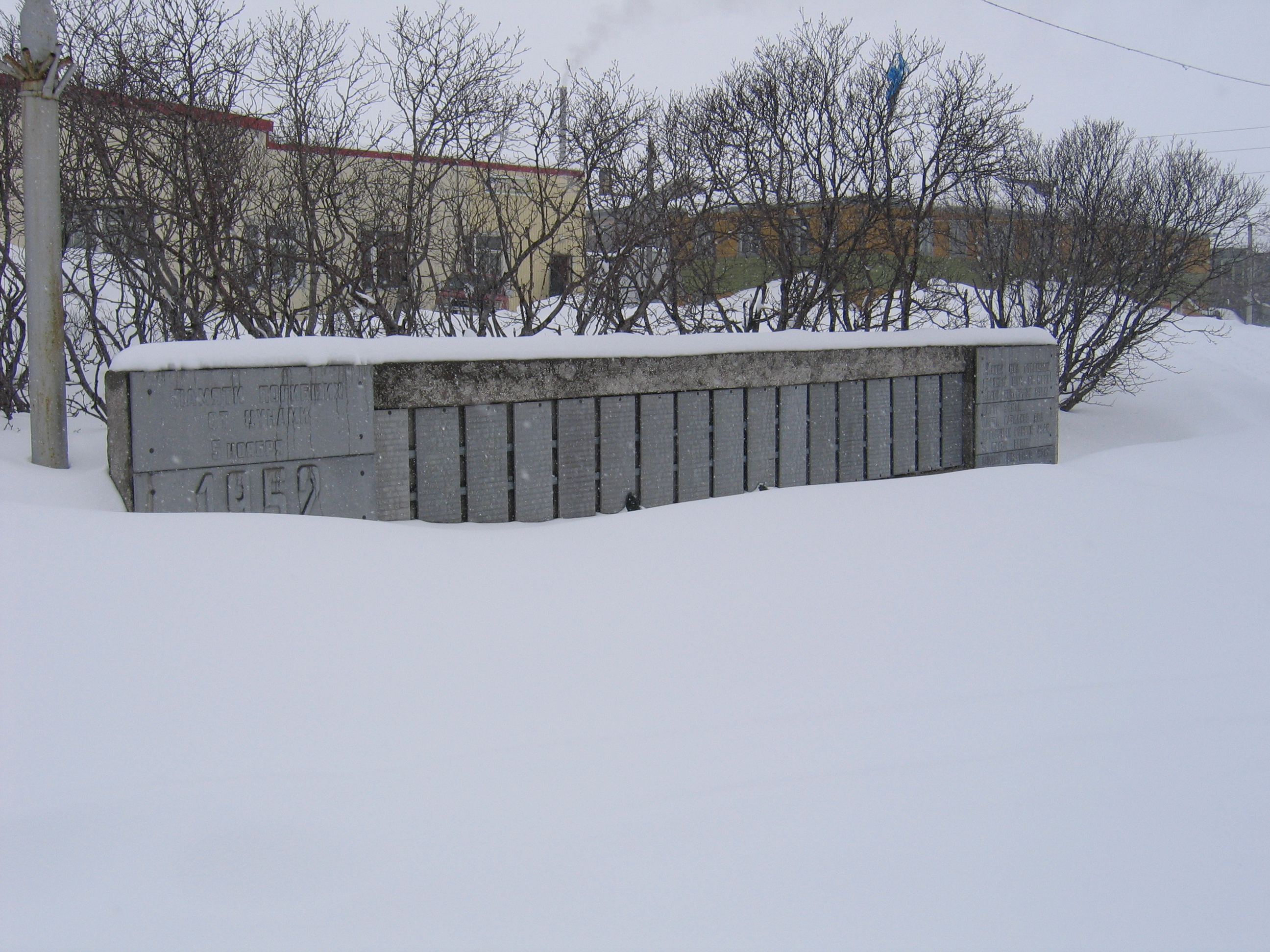 Памятник погибшим во время цунами